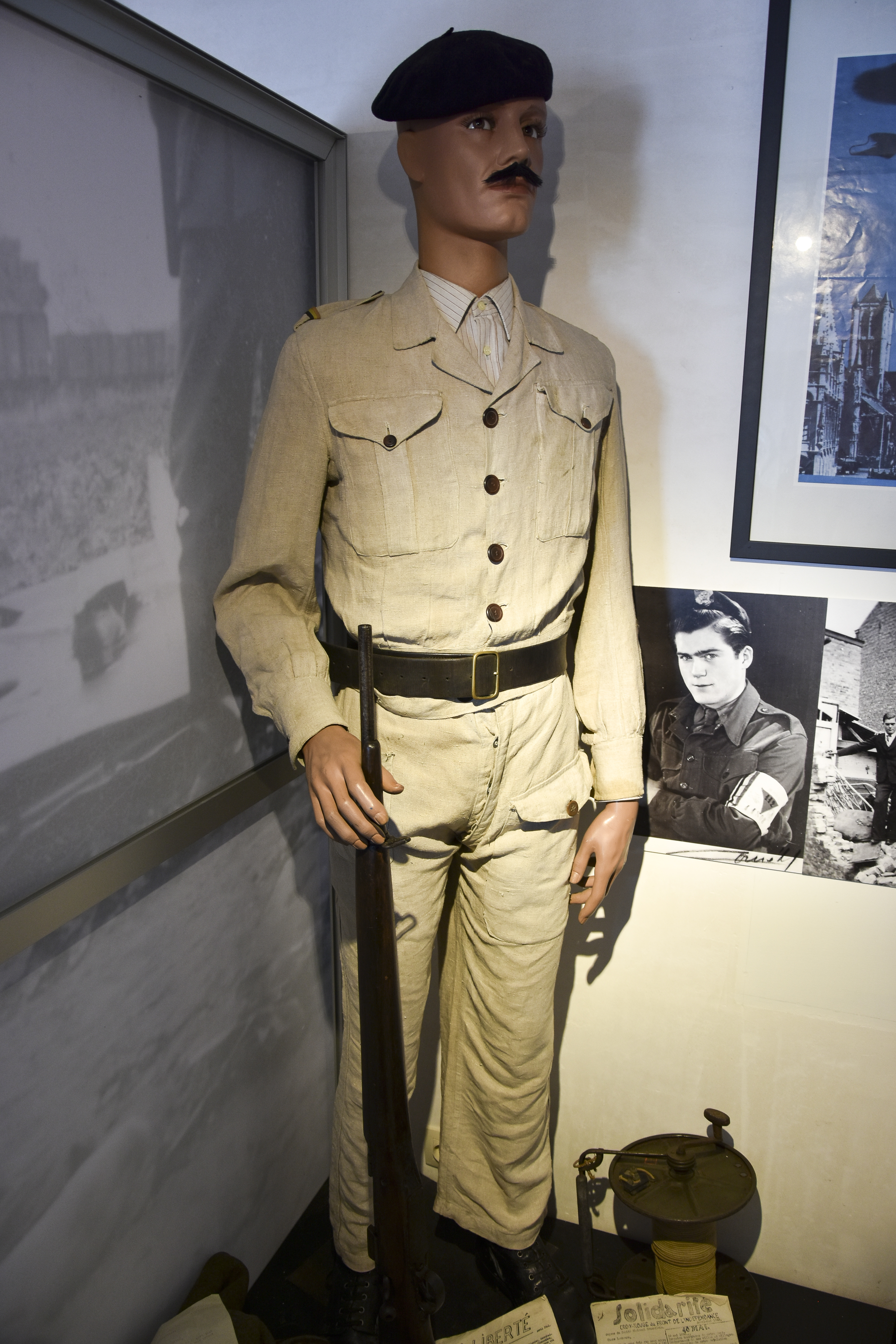 Lid Witte Brigade (weerstandersvereniging) Museum Cabour WOII & 2/4 Lansiers Adinkerke, België